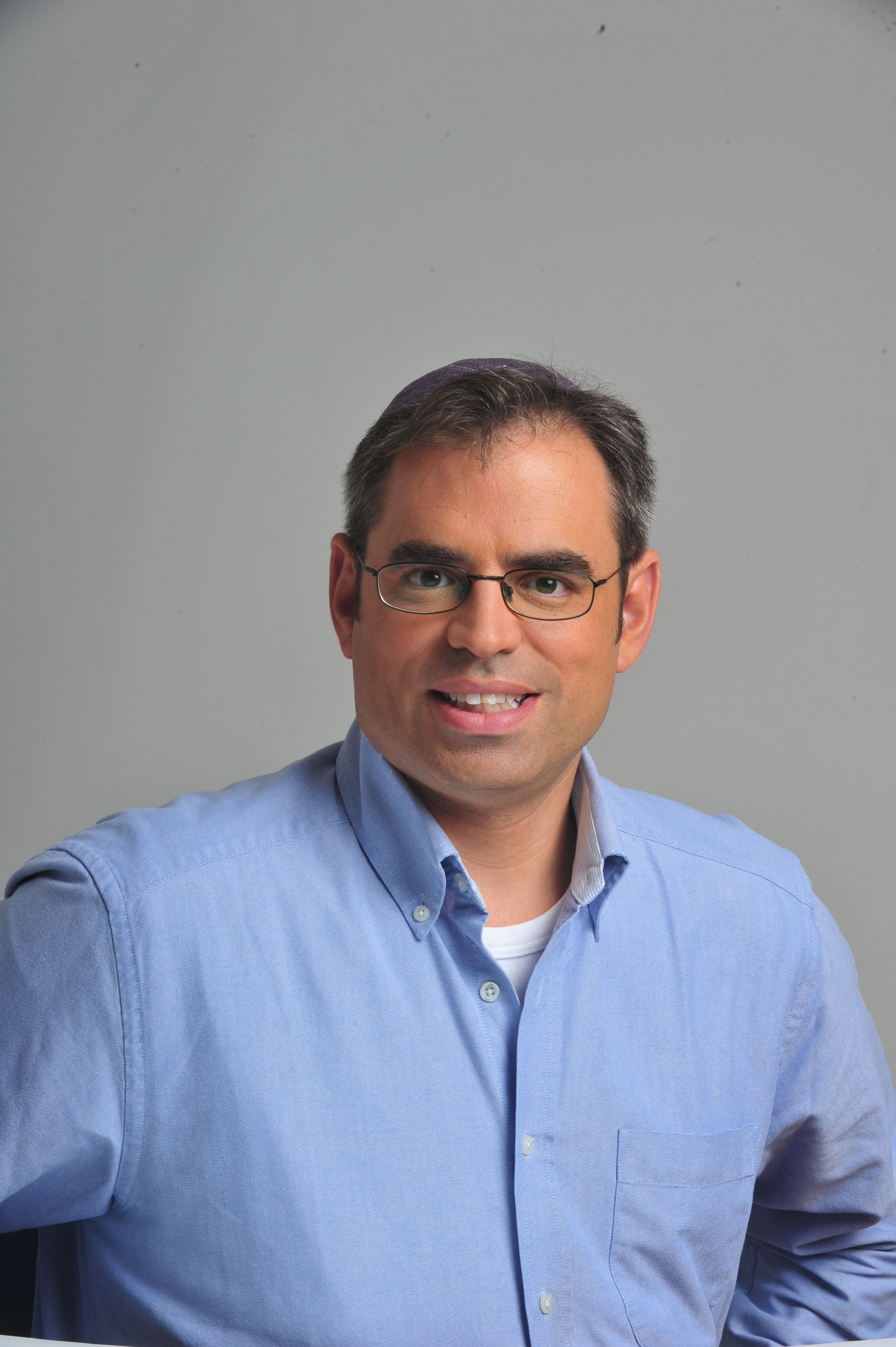 דניאל גולדמן